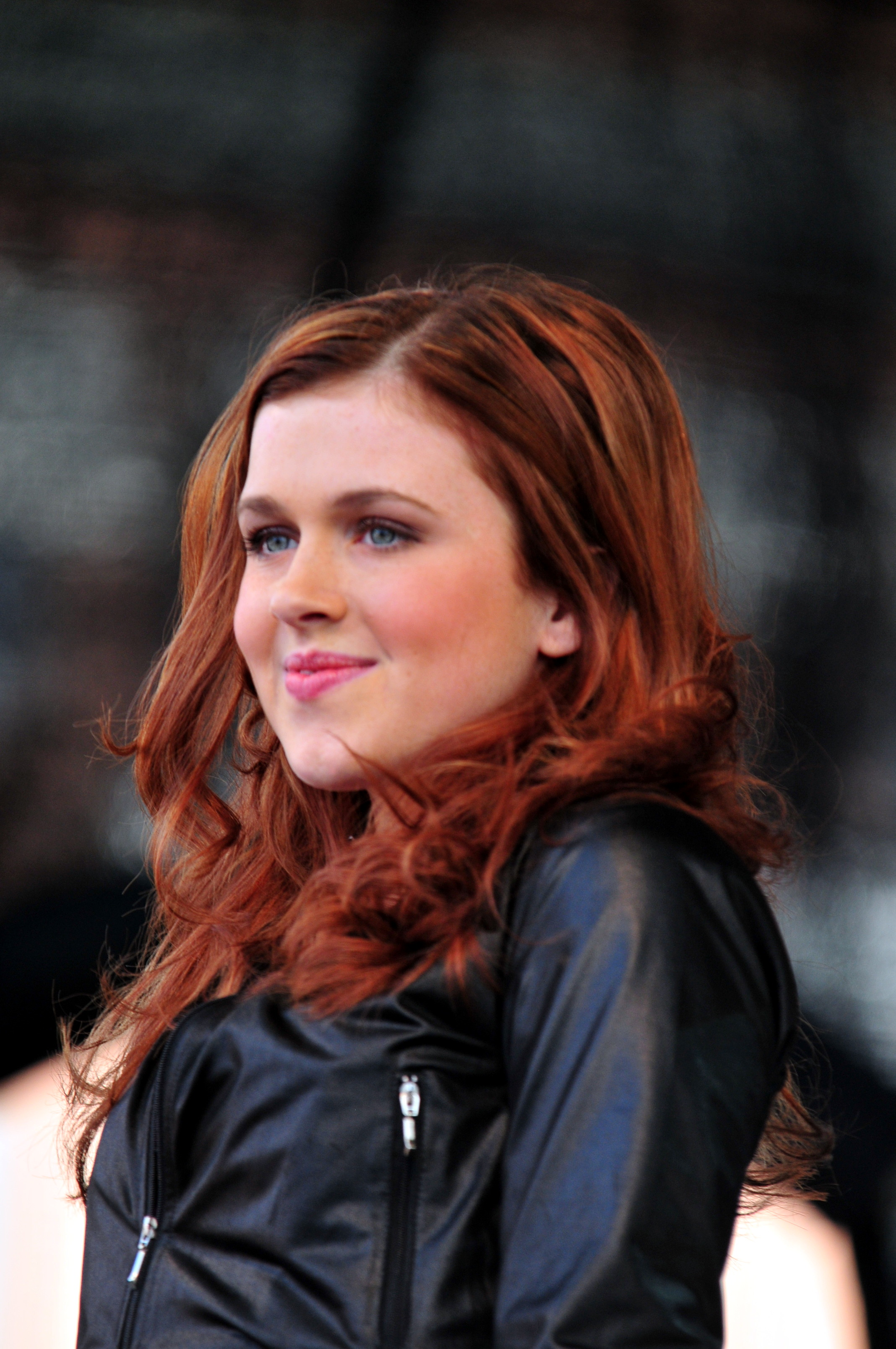 från Amy Diamonds konsert kulturnatta 2011